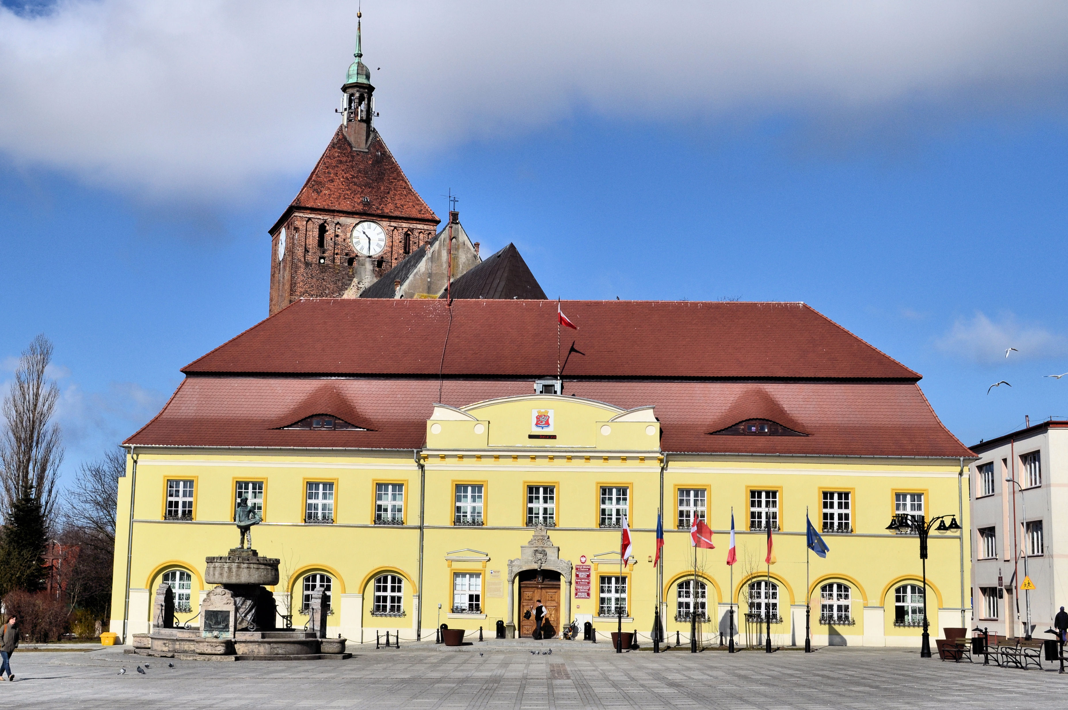 Ratusz w Darłowie